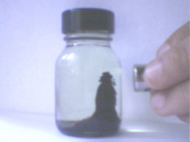 Das Bild zeigt ein Ferrofluid, das auf einen Magneten reagiert.